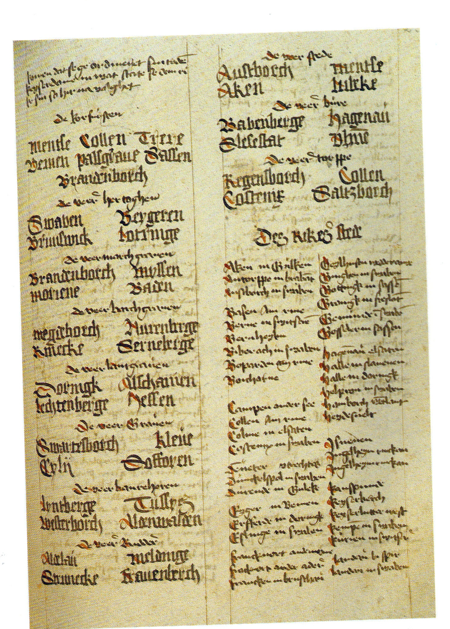 Weltchronik des Hermen Bote mit Quaternionen der Reichsverfassung, Stadtarchiv Braunschweig, H VI 1, Nr. 28, Bl. 236r